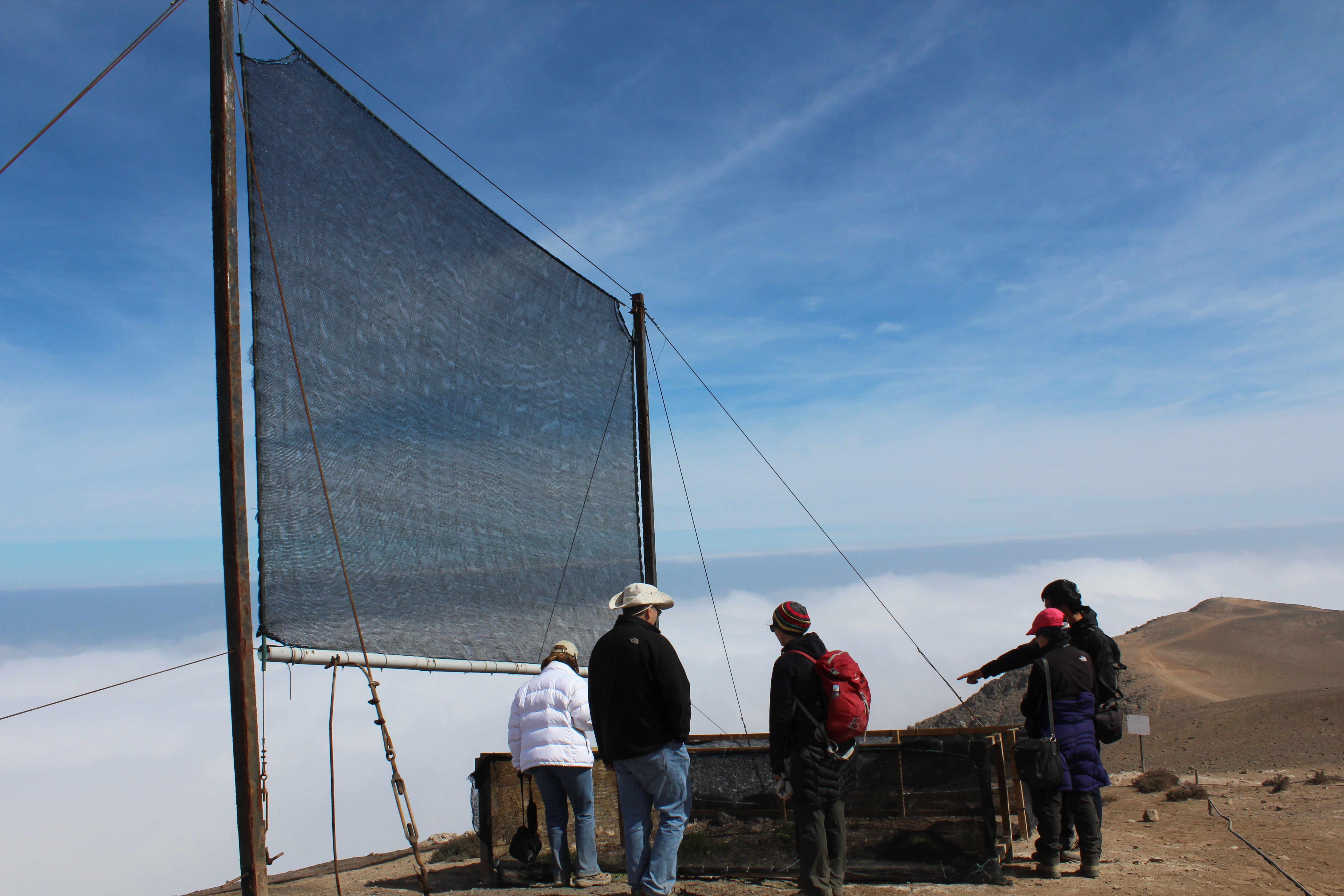 Foto: Nicole Saffie